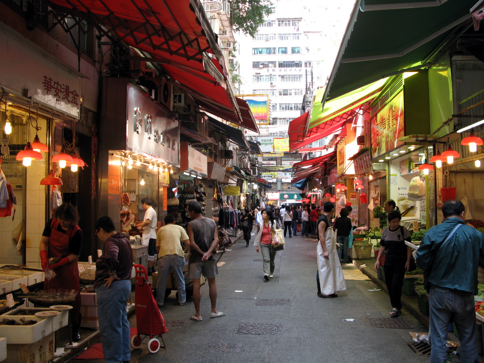 Stone Nullah Lane Market